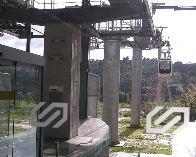 Teleferico de Esparreguera - Olesa de Montserrat